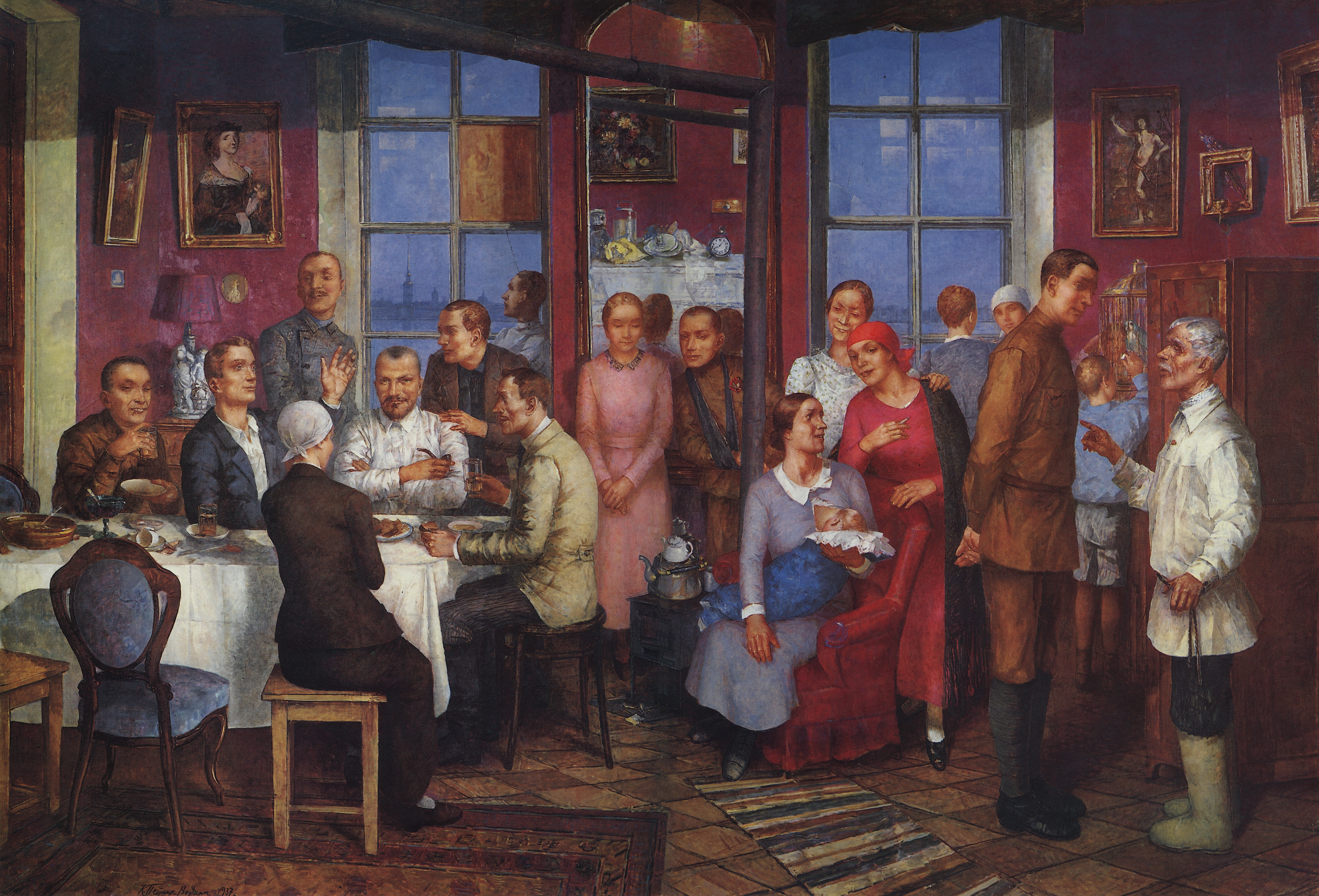 Кузьма Петров-Водкин (1878-1939). Новоселье (Рабочий Петроград).